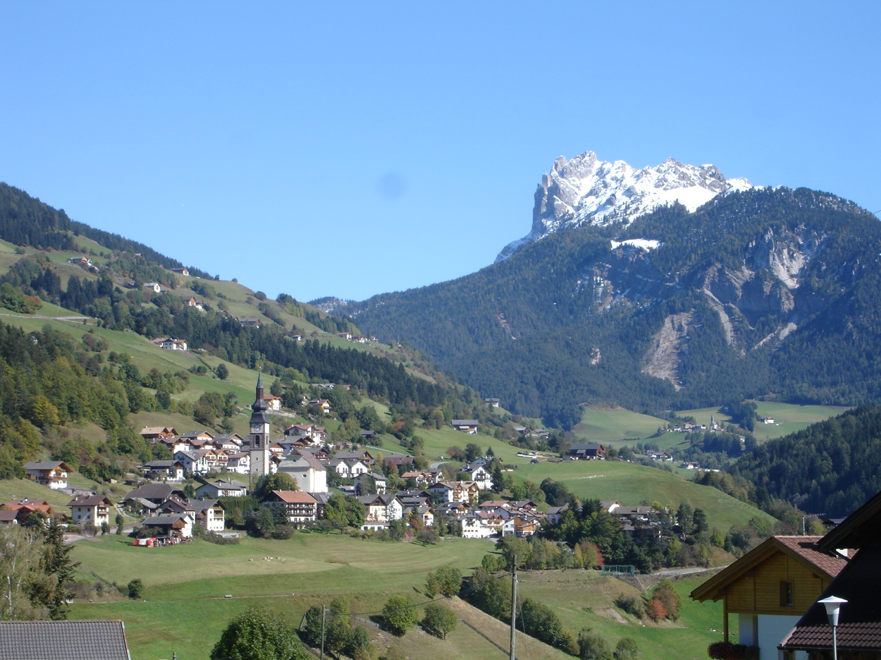 St. Peter im Villnößtal in Südtirol, dahinter die schneebedeckten Aferer Geisler